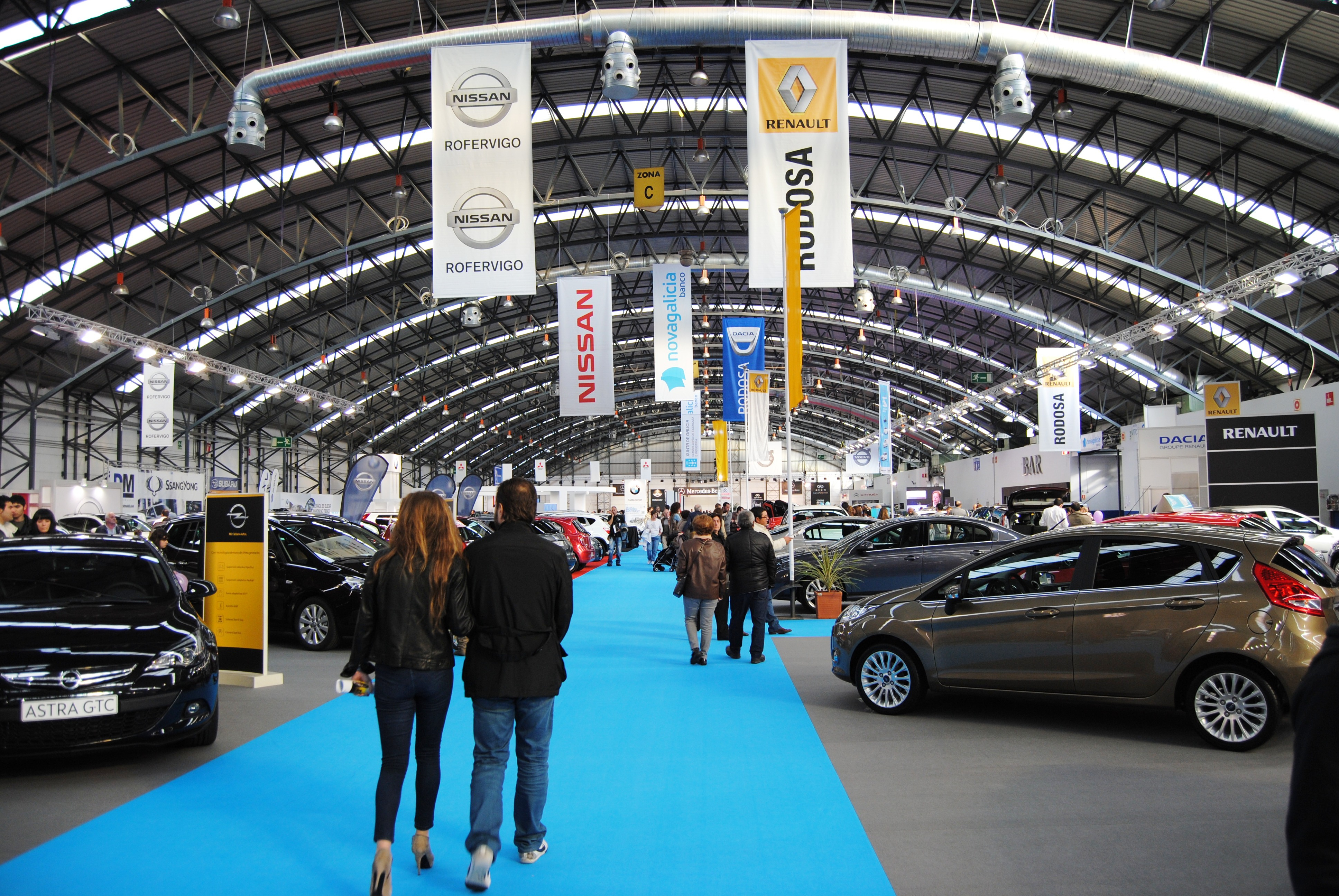 Salón do Automóbil 2012 IFEVI